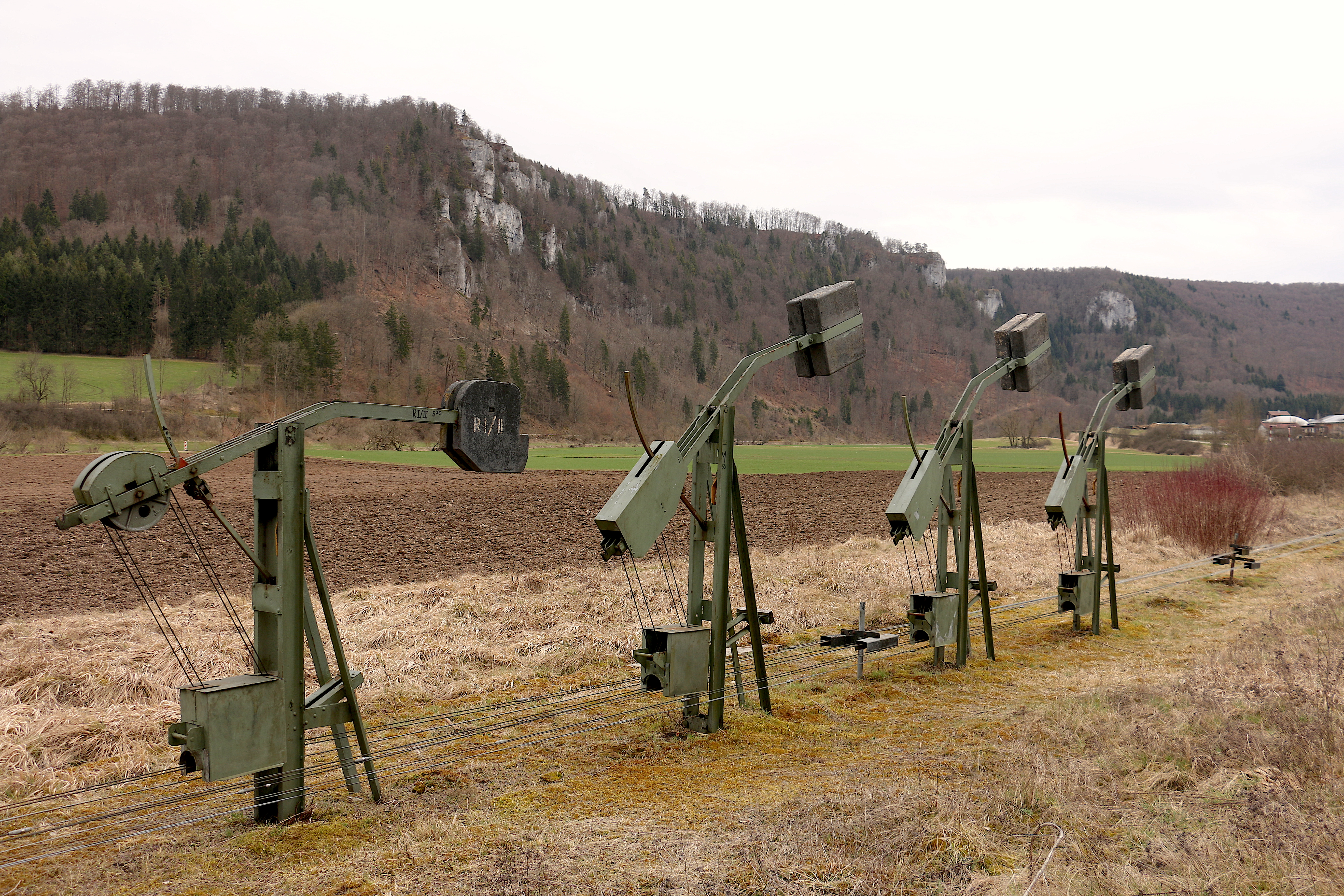 Spannwerke mit Spanngewichten Bahnhof Hausen im Tal (2018)